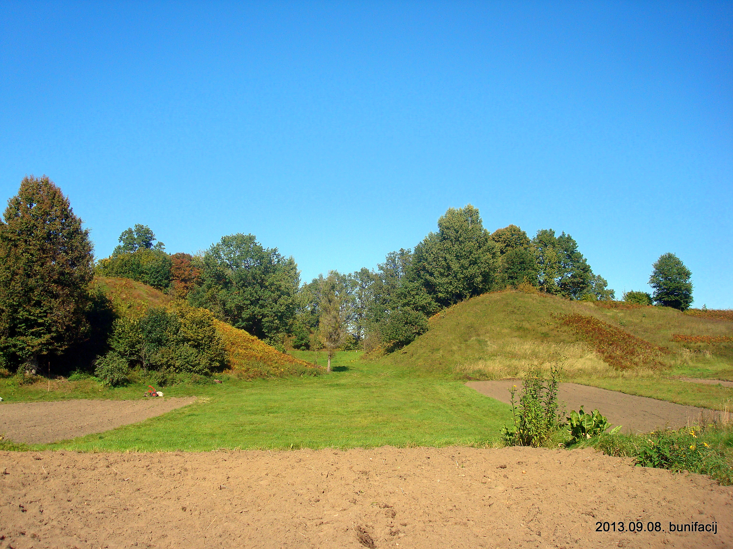 Замчища